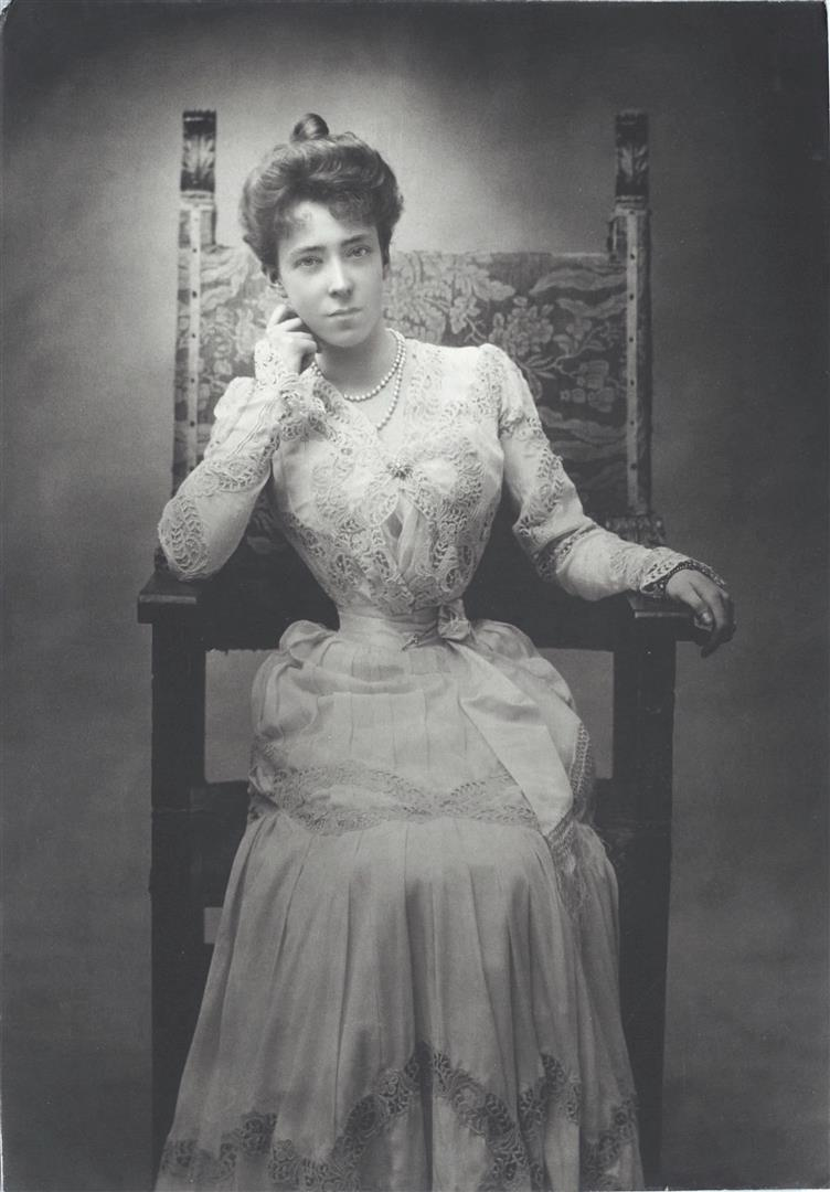 Elisabeth in Bavaria, future queen of Belgium, vente aux enchères "Photographies par Otto Wegener (1849-1924)" à Hôtel de vente Drouot le 8 novembre 2018